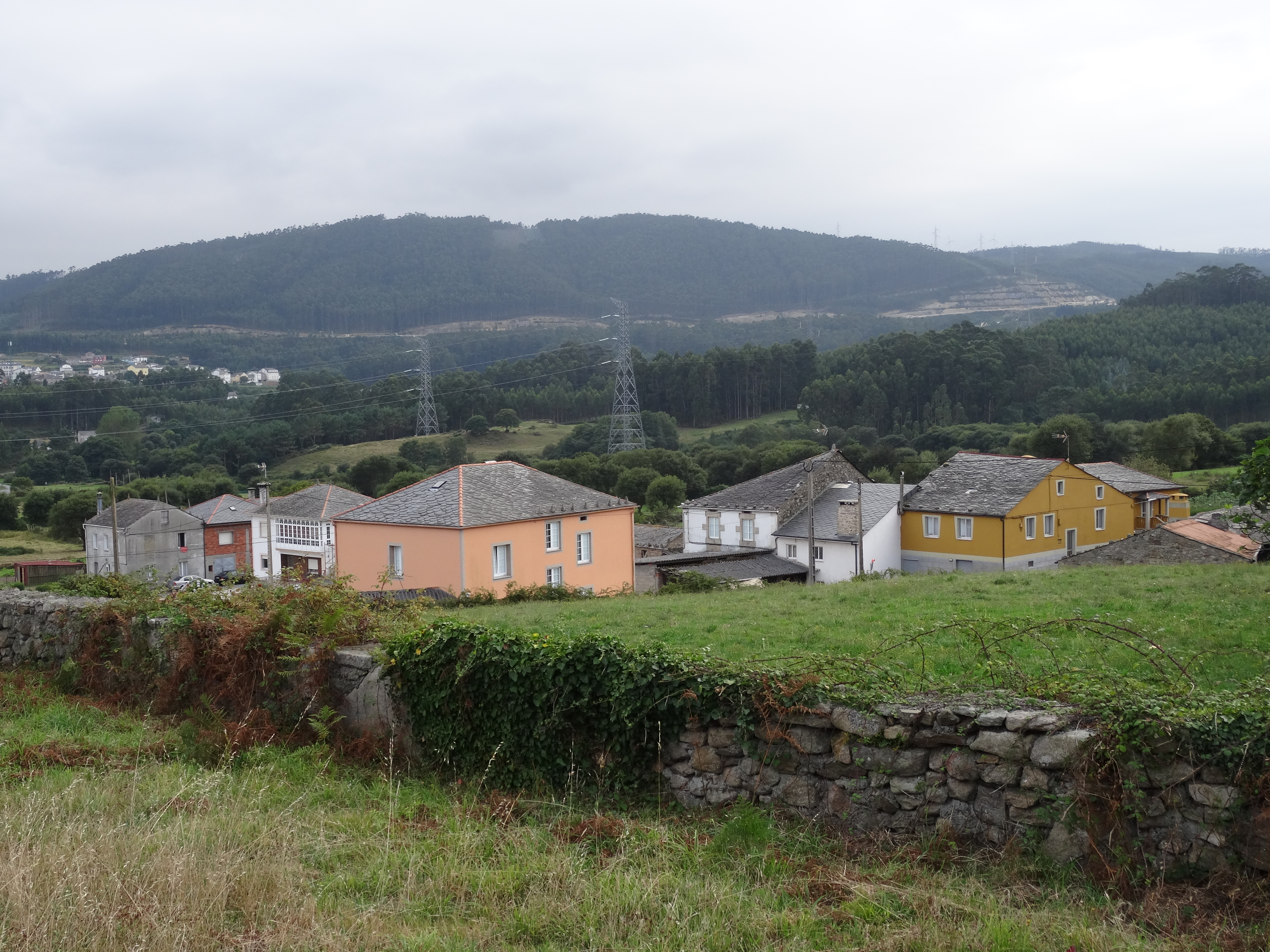 Ver título.